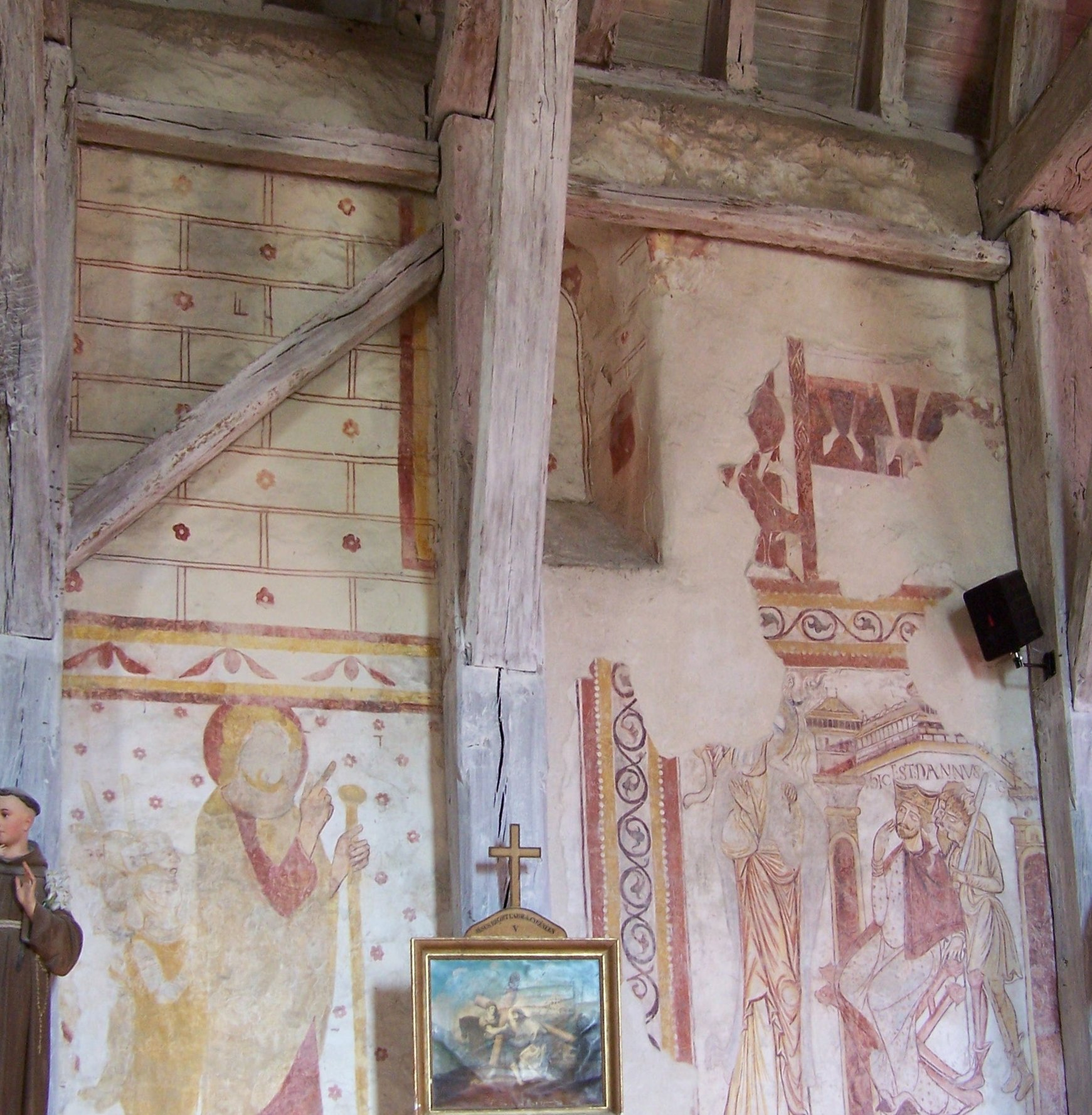 Fresque